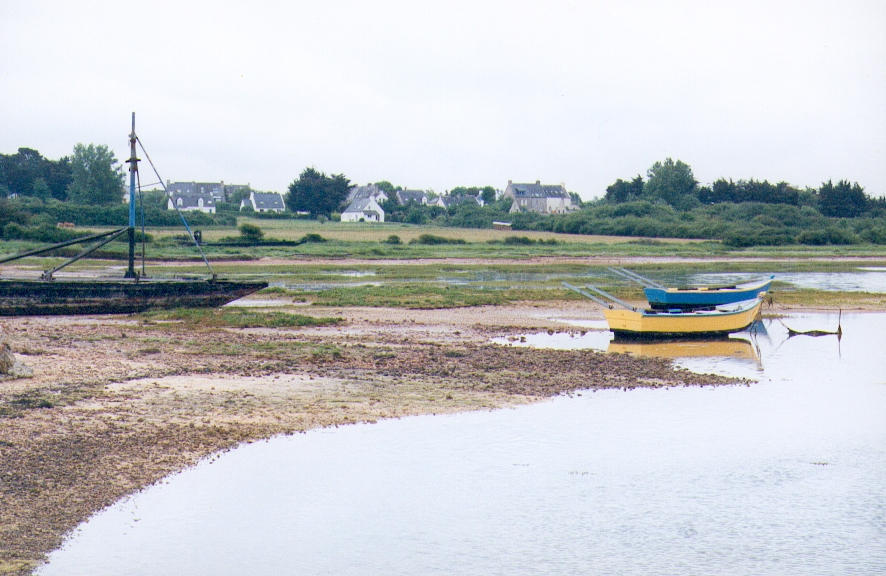 Vasière sur l'île d'Arz dans le Morbihan en Bretagne